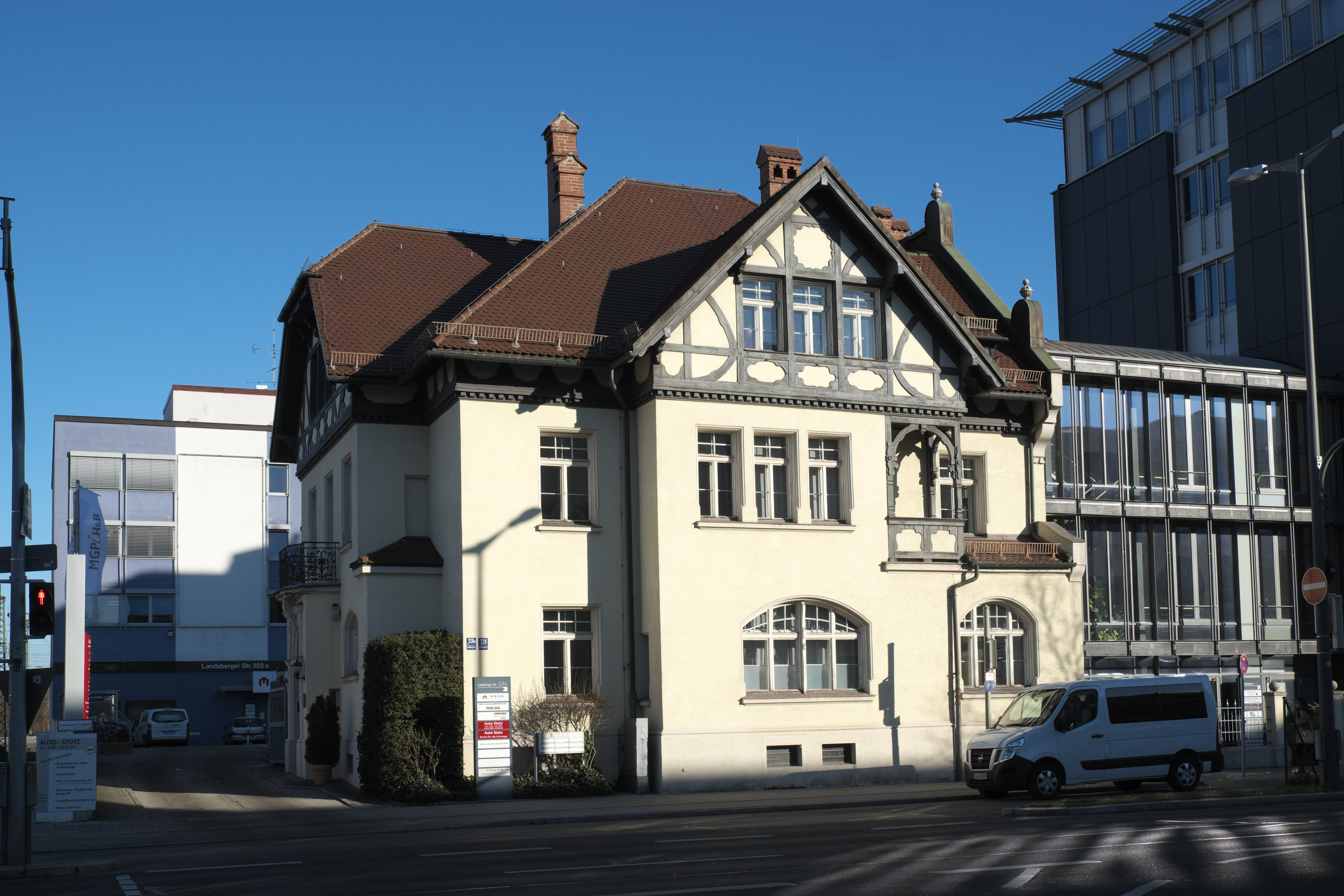 Villa in der Landsberger Straße 328 im Stadtbezirk Laim in München (Bayern/Deutschland), um 1900